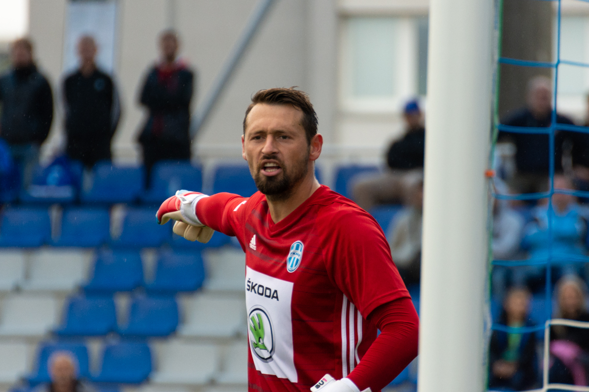 Jan Šeda vs FK Teplice